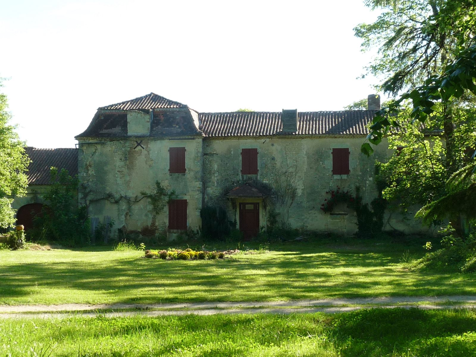 logis d'Aignes (16), France